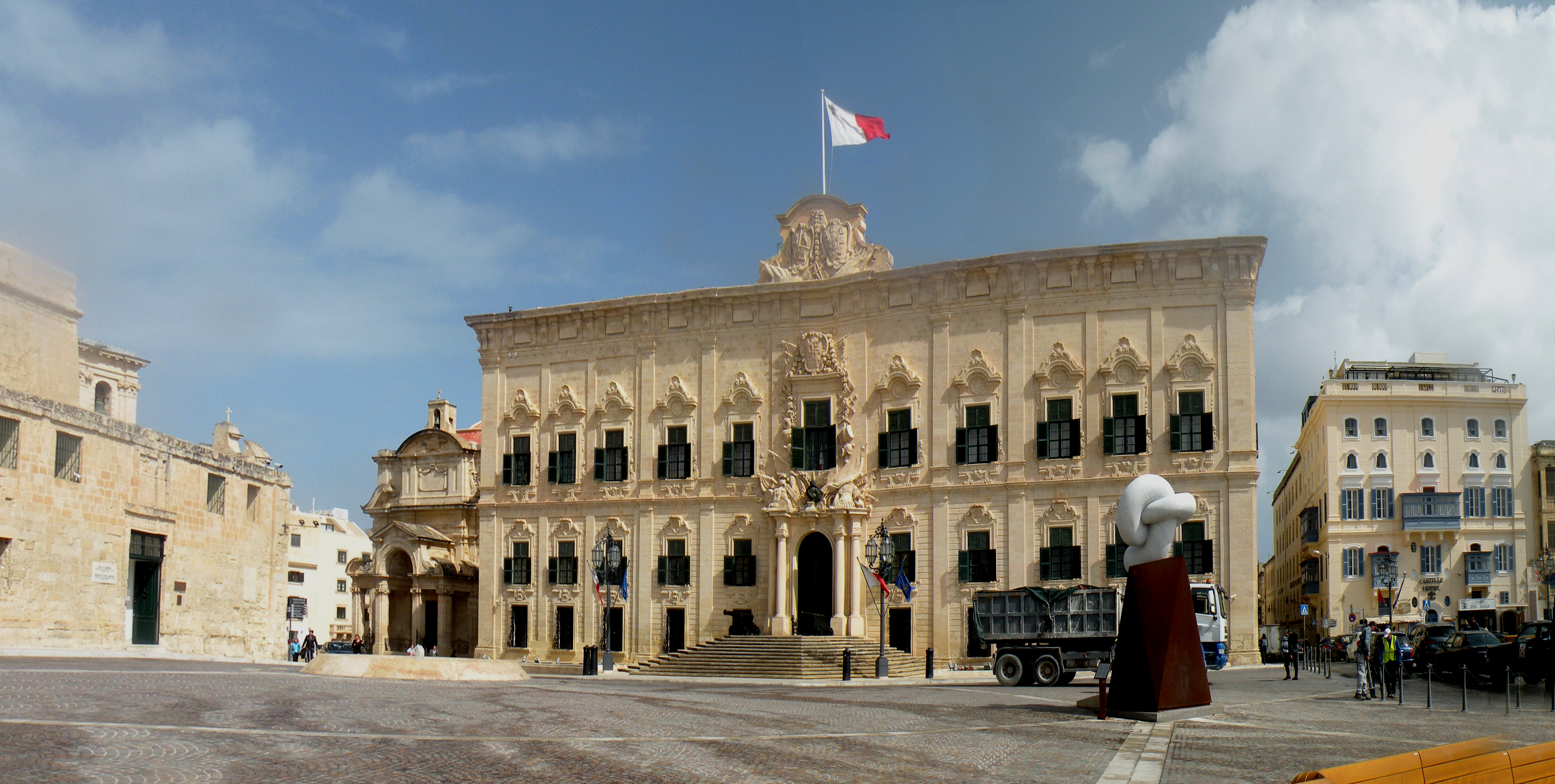 Кастильская резиденция